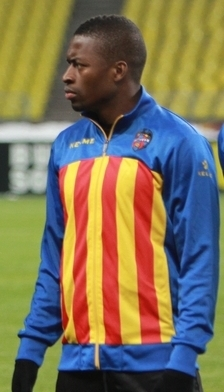 Prèvia del partit de tornada dels huitens de la Uefa Europa League